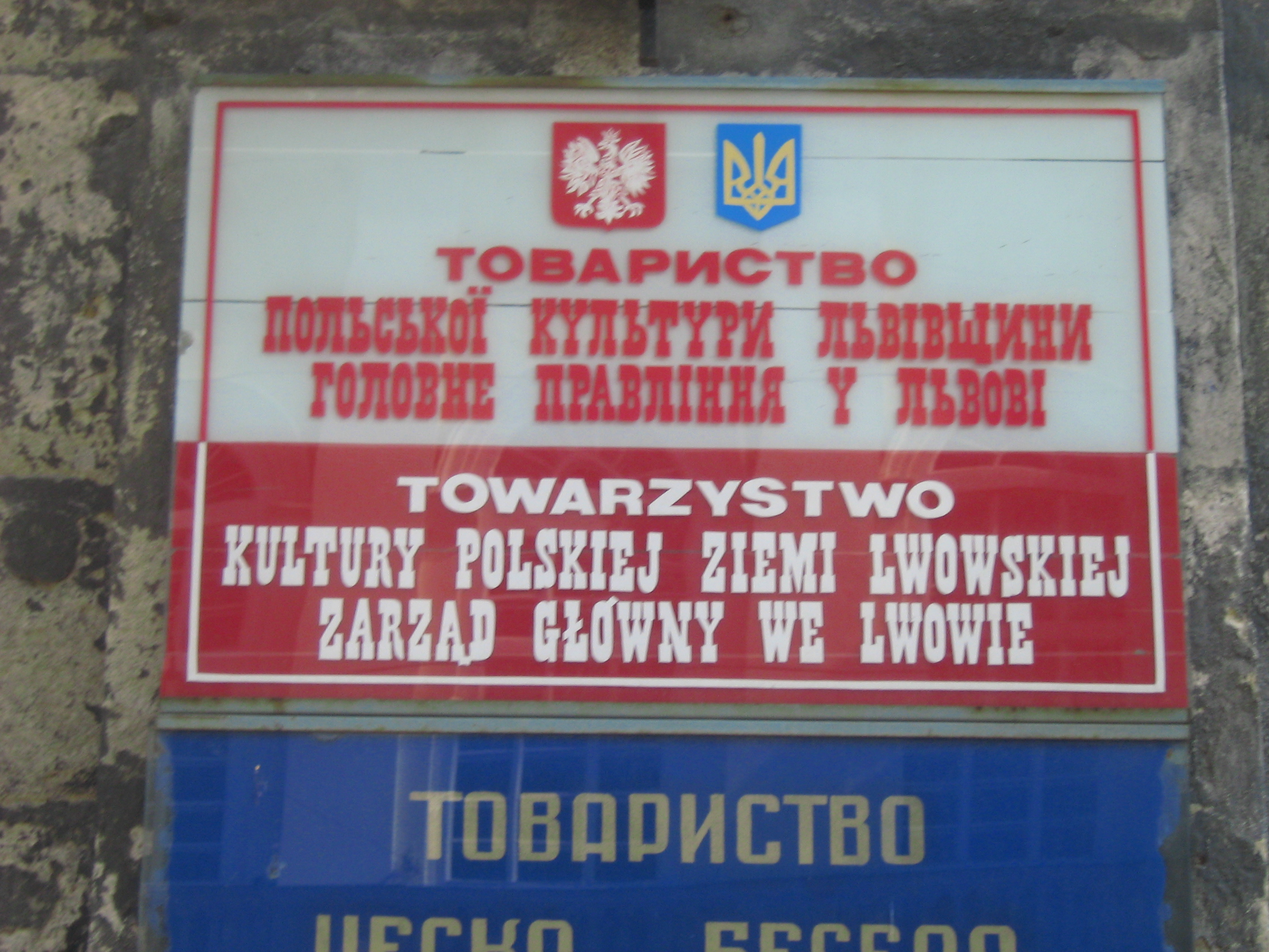 Towarzystwo Kultury Polskiej Ziemi Lwowskiej